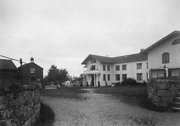 Rostad gård på Inderøy ca. 1890.